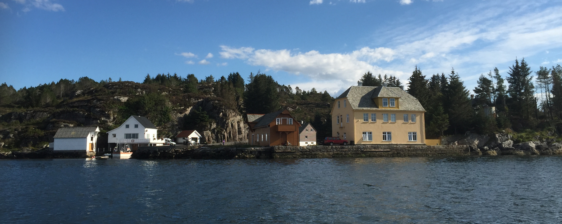 Døscherholmen ved Tofterøy i Sund kommune